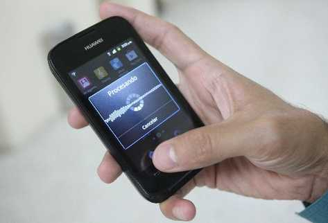 Foto de teléfono.